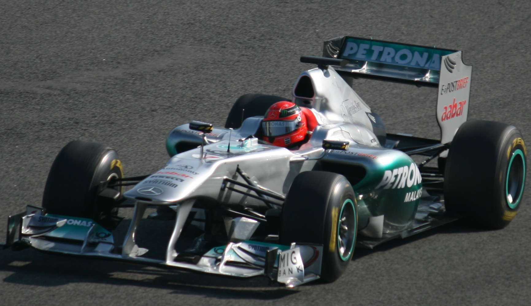 Michael Schumacher Mercedes MGP W02